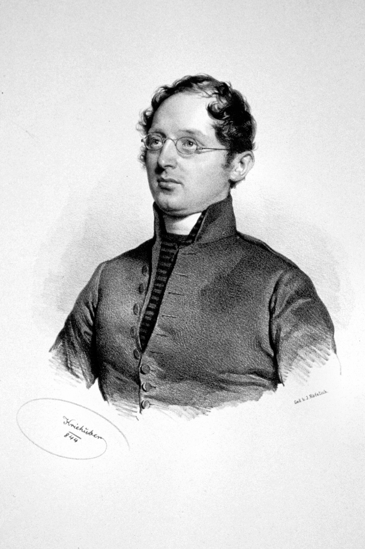 Gaetano Bedini (1806-1864), Bischof von Viterbo, Kardinal